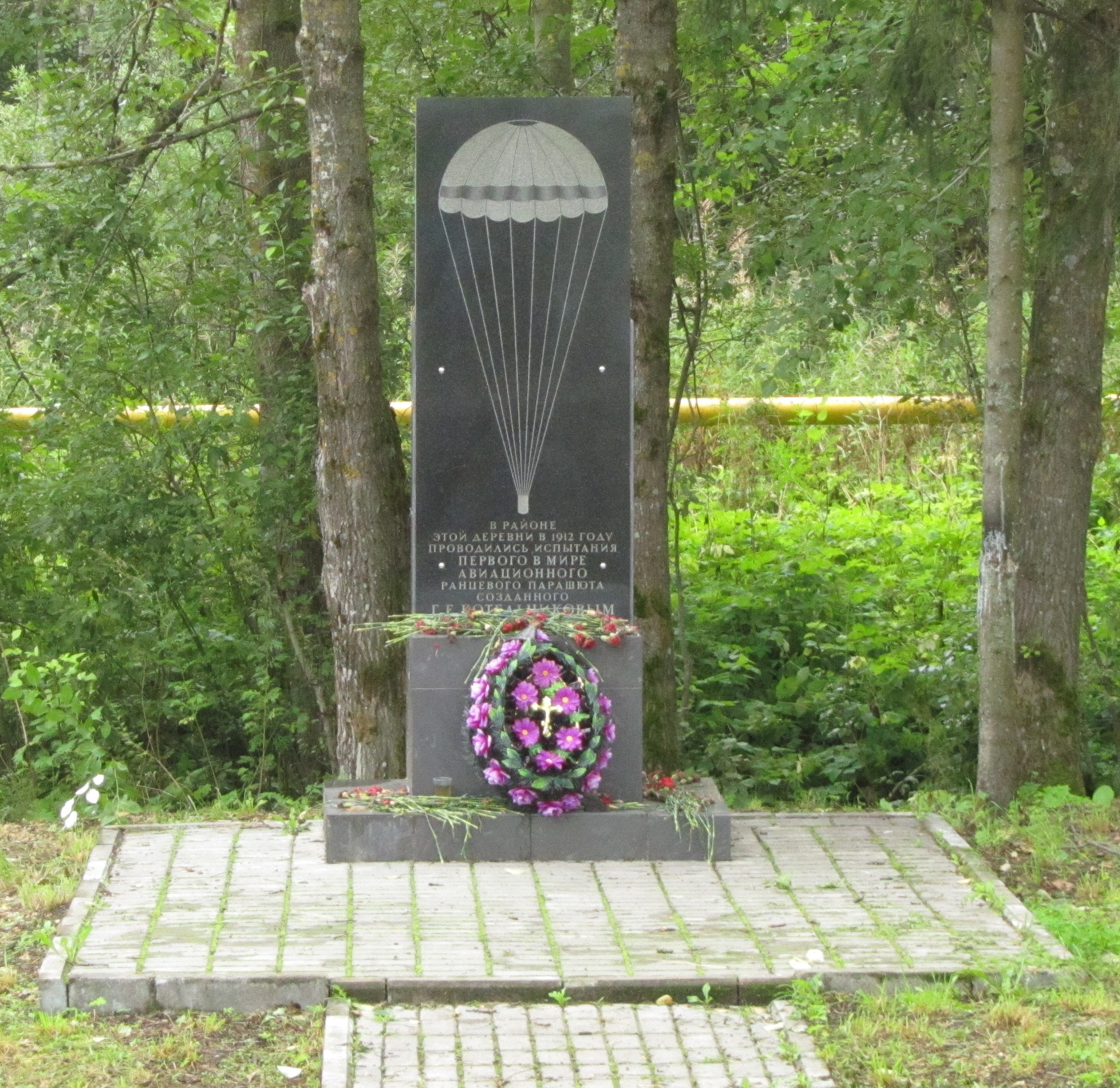 Памятник у деревни Котельниково